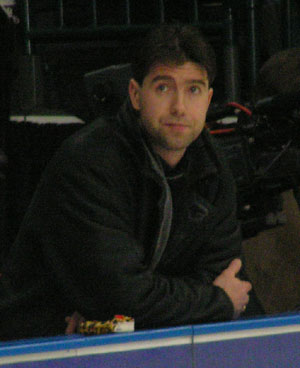 Alexei Urmanow (Russische Meisterschaften 2005)